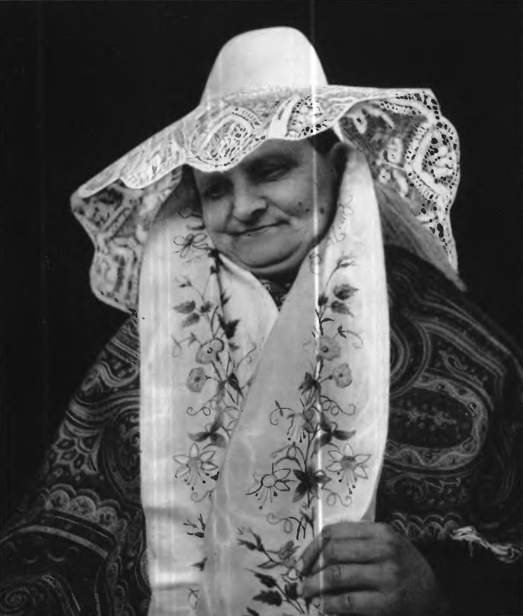 Eine alte Roßbergerin in ihrer Tracht mit Haube, einem Tuch über der Jacke und Band mit Blumenmuster.